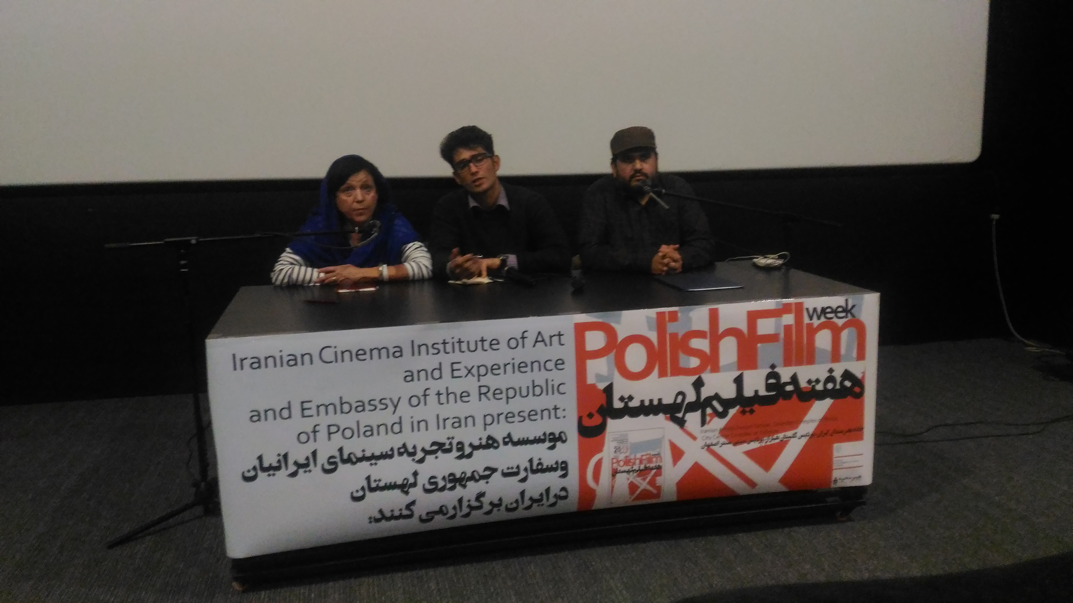 Joanna Kos-Krauze and Reza dorimishian- polish film week in iran 2019